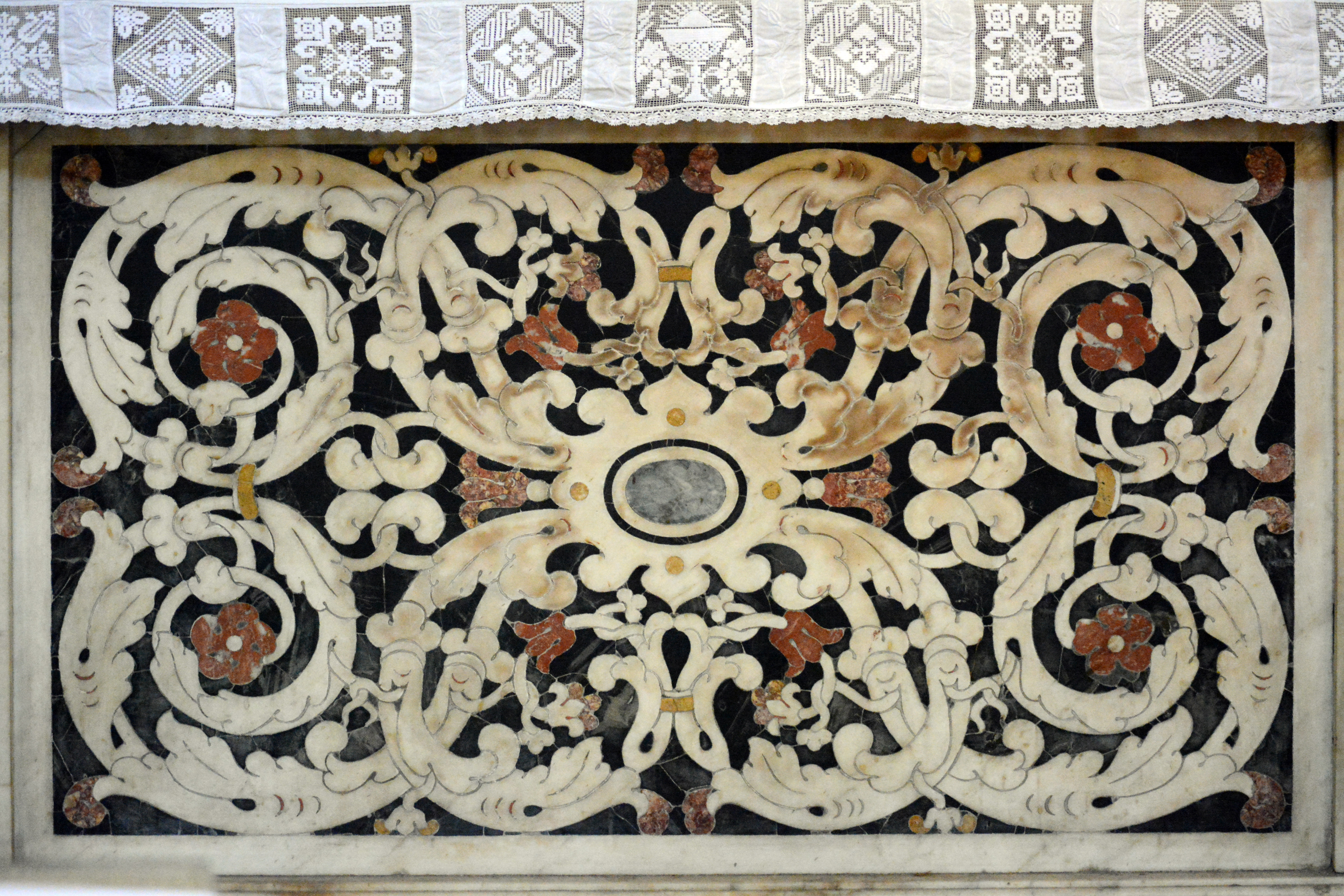 Elément de décor intérieur Cathédrale Sainte Réparate_Nice (Alpes-Maritimes, France) ; troisième chapelle méridionale en partant de l'entrée, dédiée à Ste Réparate; panneau central du devant d'autel en marquèterie de marbres polychromes.